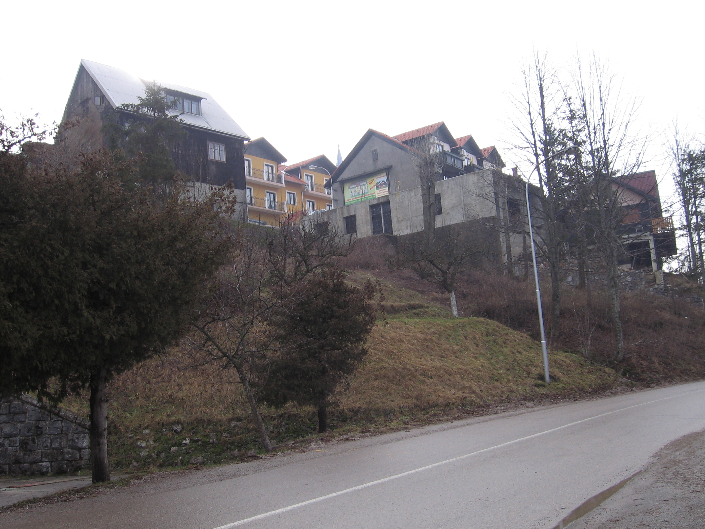 Fužine - Vlasništvo, Zeljko